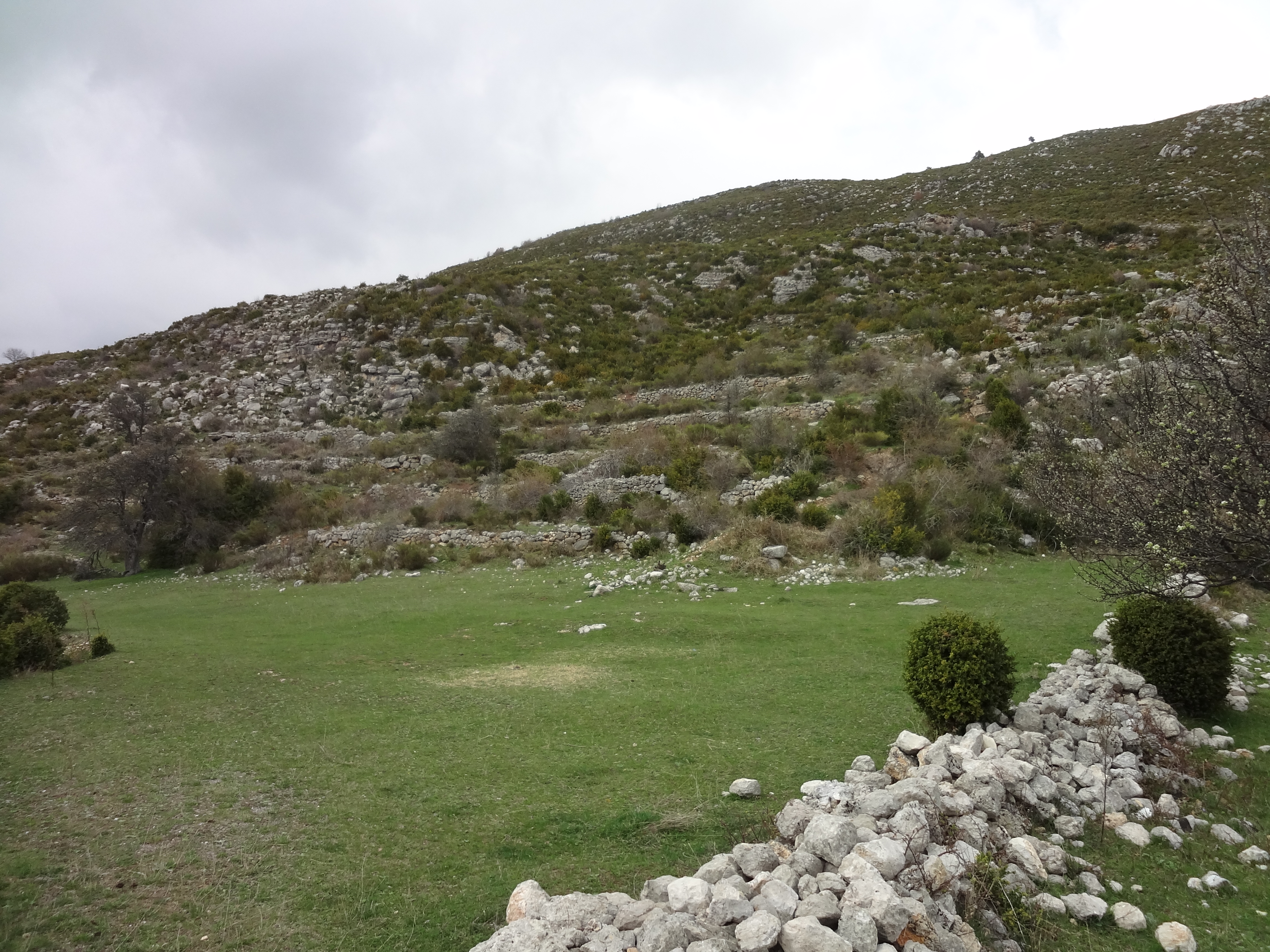 Vestiges de cultures en terrasses, retenues par des murs de pierre sèche, à Saint-Saturnin, La Rochette (Alpes-de-Haute-Provence)